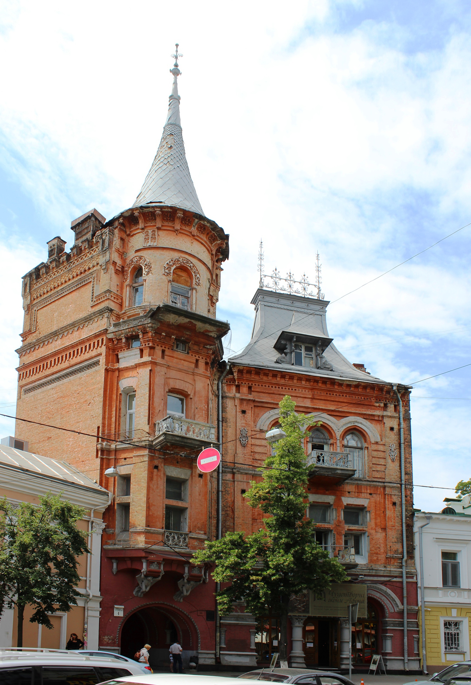 Будинок прибутковий 1896–1898